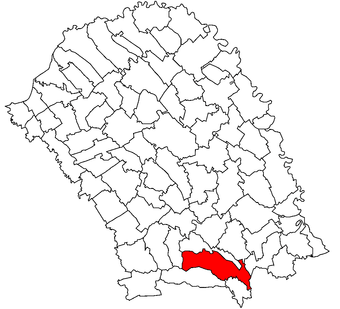 Categorie:Hărţi ale judeţului Botoşani